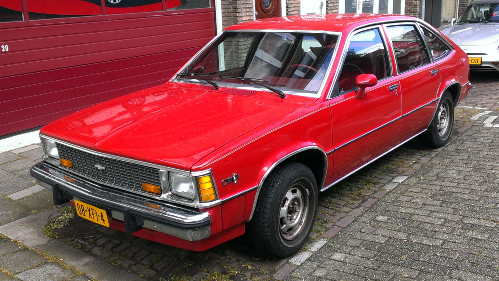 1980 Chevrolet Citation